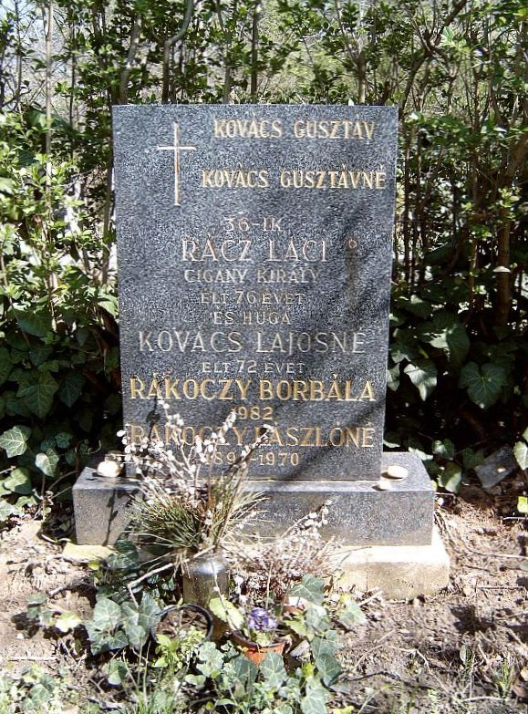 Rácz Laci (Pest, 1867. június 4. – Budapest, 1943. május 6.) cigányprímás sírja Budapesten. Új köztemető: 2/5-1-89